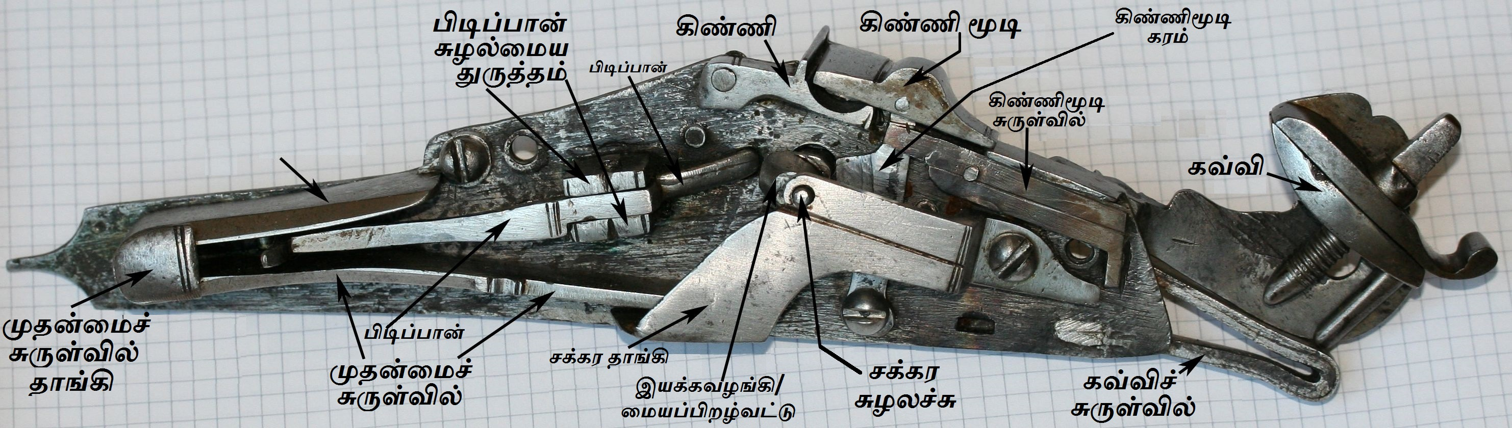 சக்கர இயக்கத் துப்பாக்கியின் இயக்கம். திறந்த நிலையில்